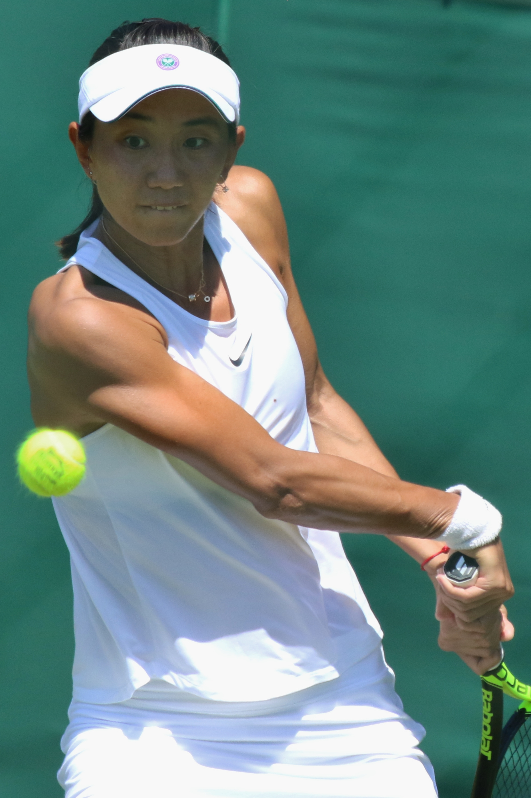 Lu, Jia-Jing WMQ18 (13)